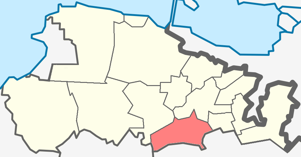 Кипенское сельское поселение Ломоносовского района Ленинградской области.